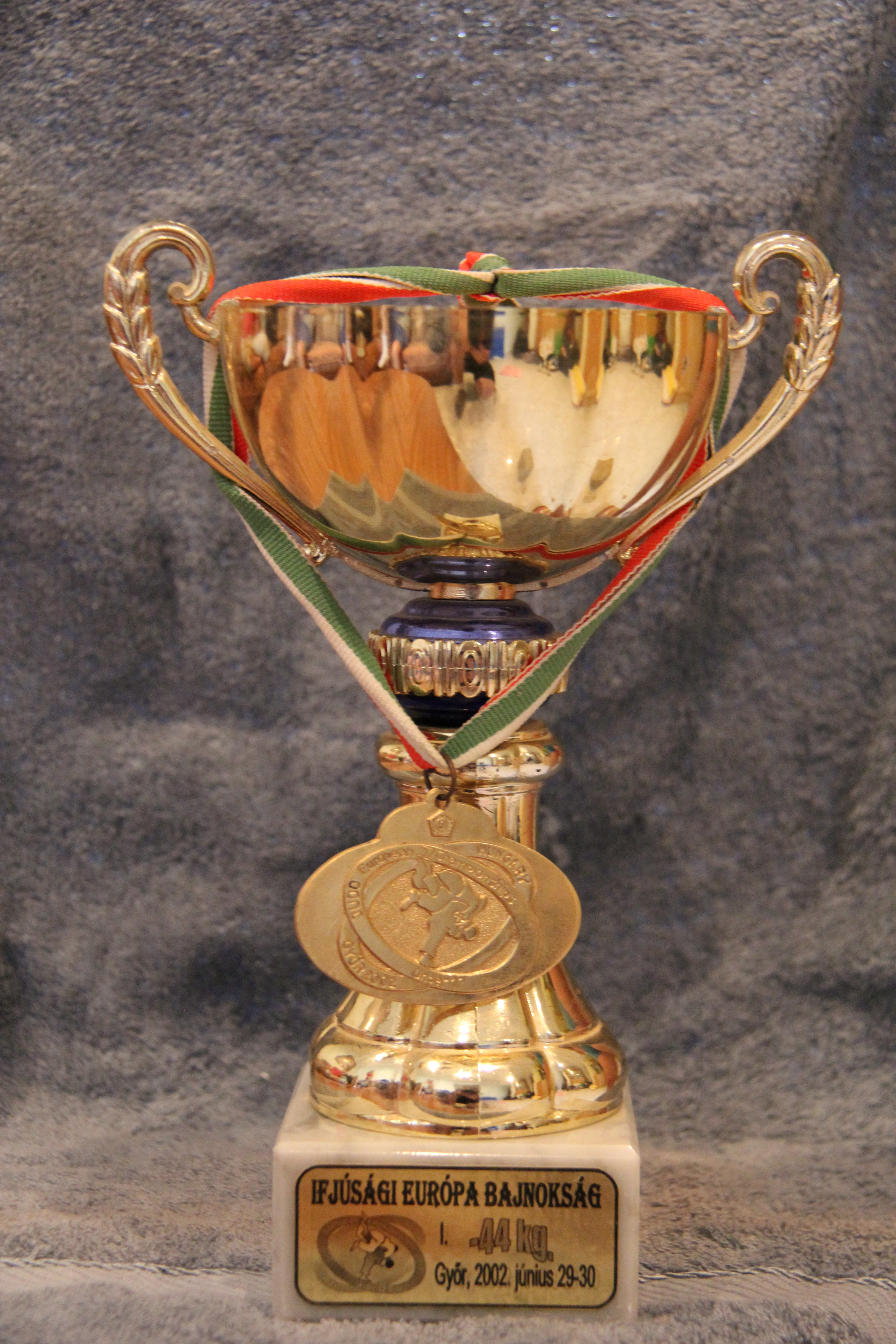 אליפות אירופה 2002 מקום 1 44קג